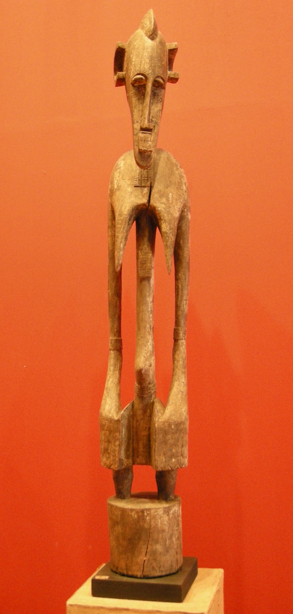 Arte dell'ex dahomey (benin), figura tutelare